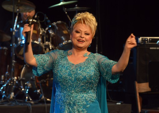 Првиот дел од концертот беше наменет за потсетување на нејзините безвременски хитови од почетокот на кариерата : Кога љуби мома млада, Марко Марко, Стара мајко, Личен Дејан...)